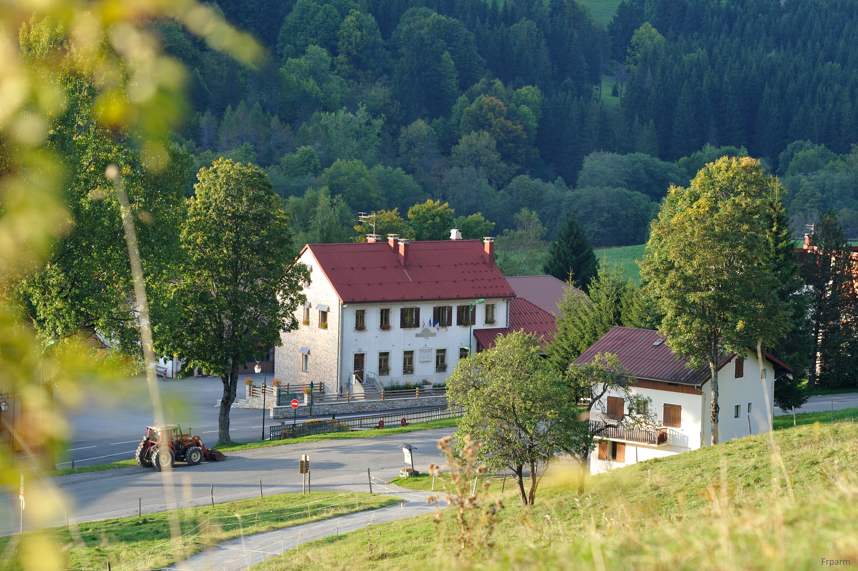 Mairie et Ecole de Lélex